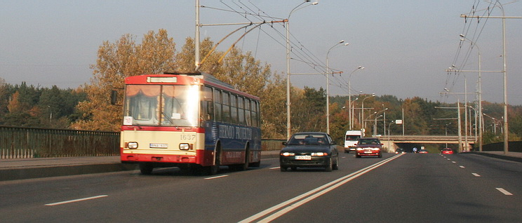 Trolleybus on Valakupiai Bridge in Žirmūnai, Vilnius.